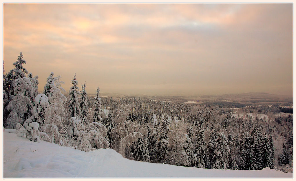 В окрестностях г. Jämsä (Финляндия)